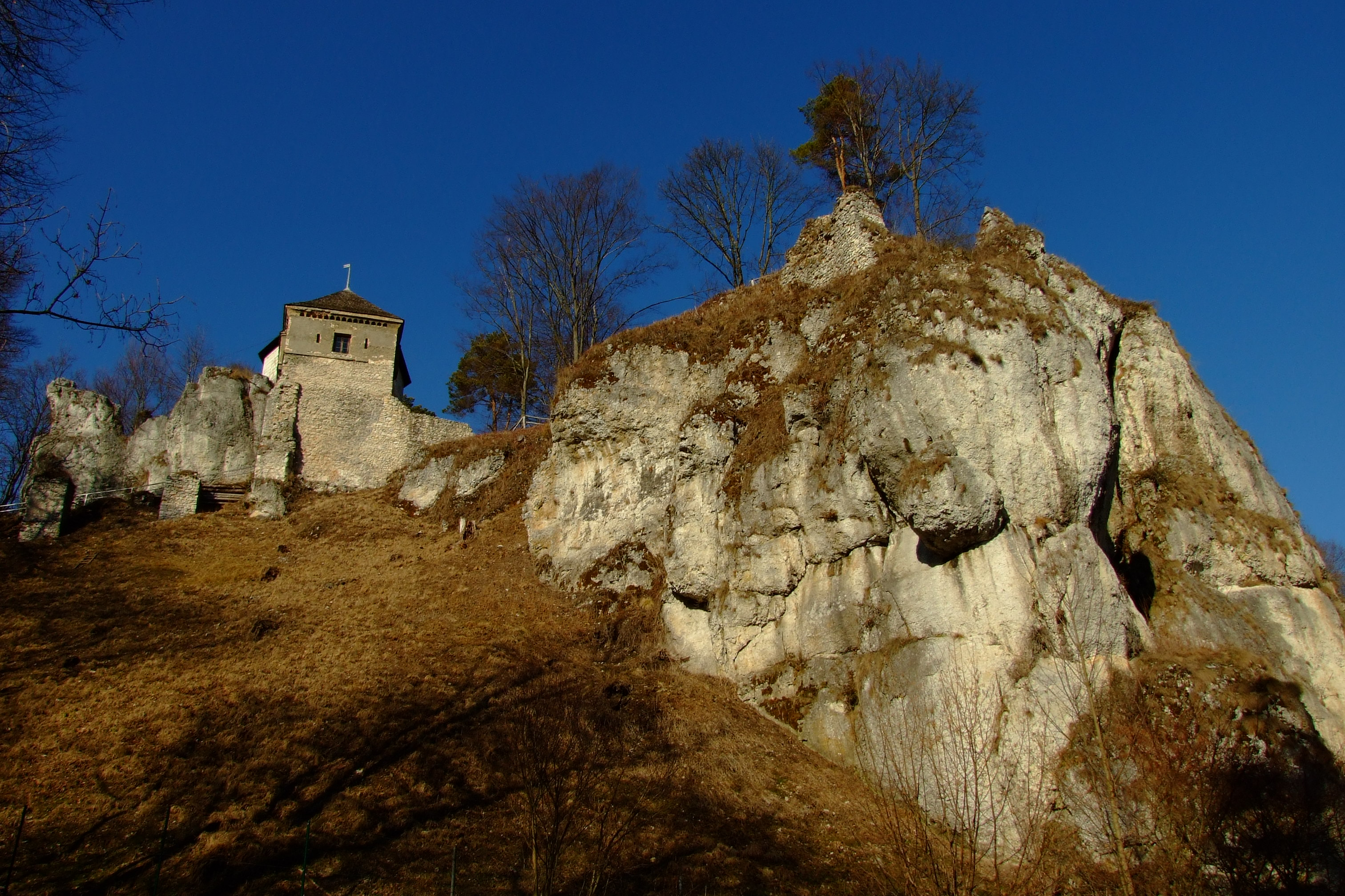 Zamek w Ojcowie